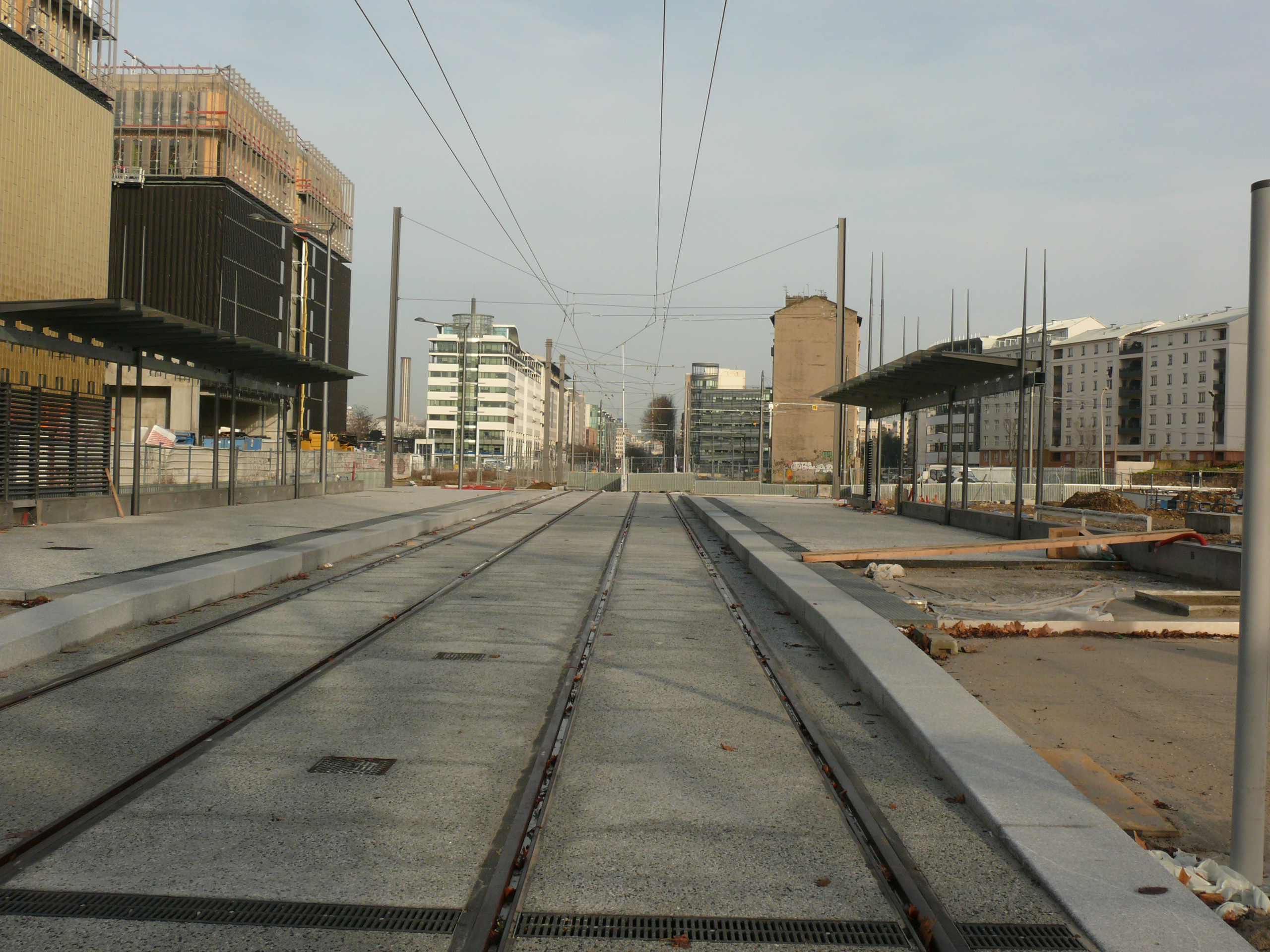 T4 - Aménagement de la future station "Part-Dieu Sud" en décembre 2012